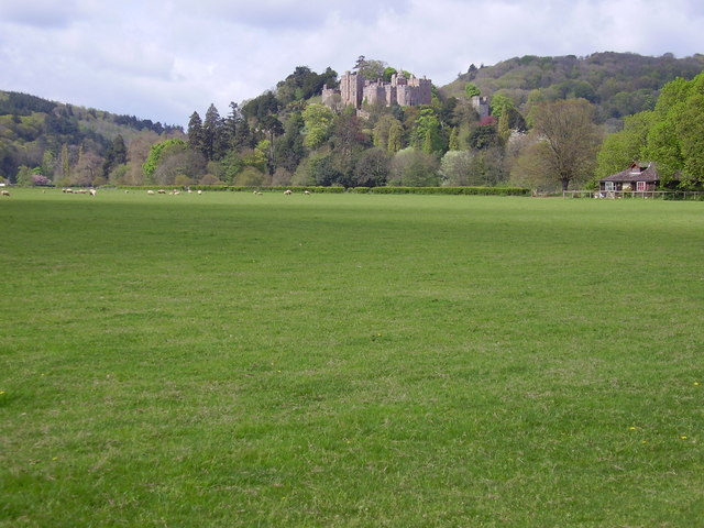 Dunster Castle, Somerset